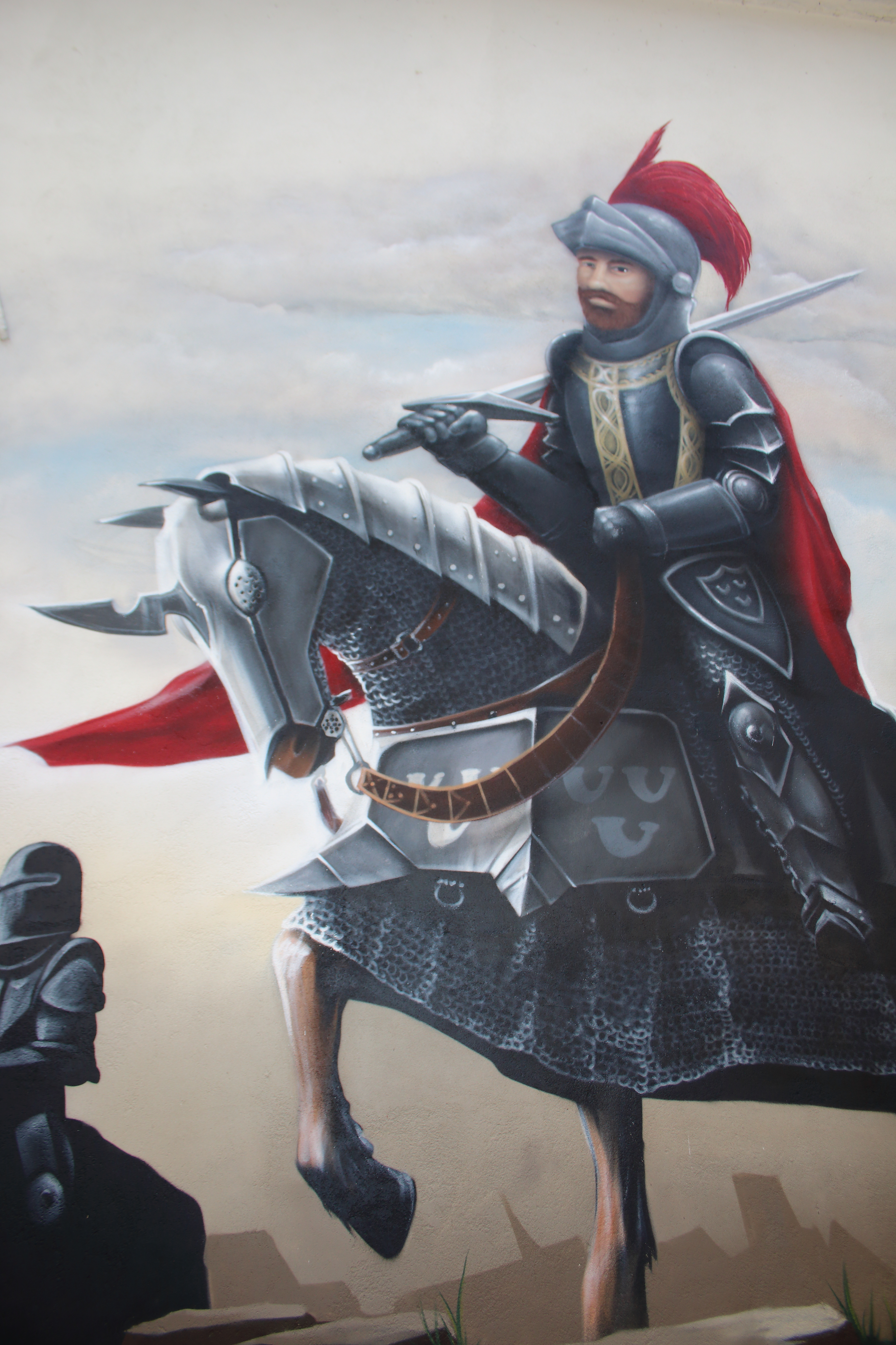 Muurschildering Philips van Horne, Weert, Limburg, Nederland